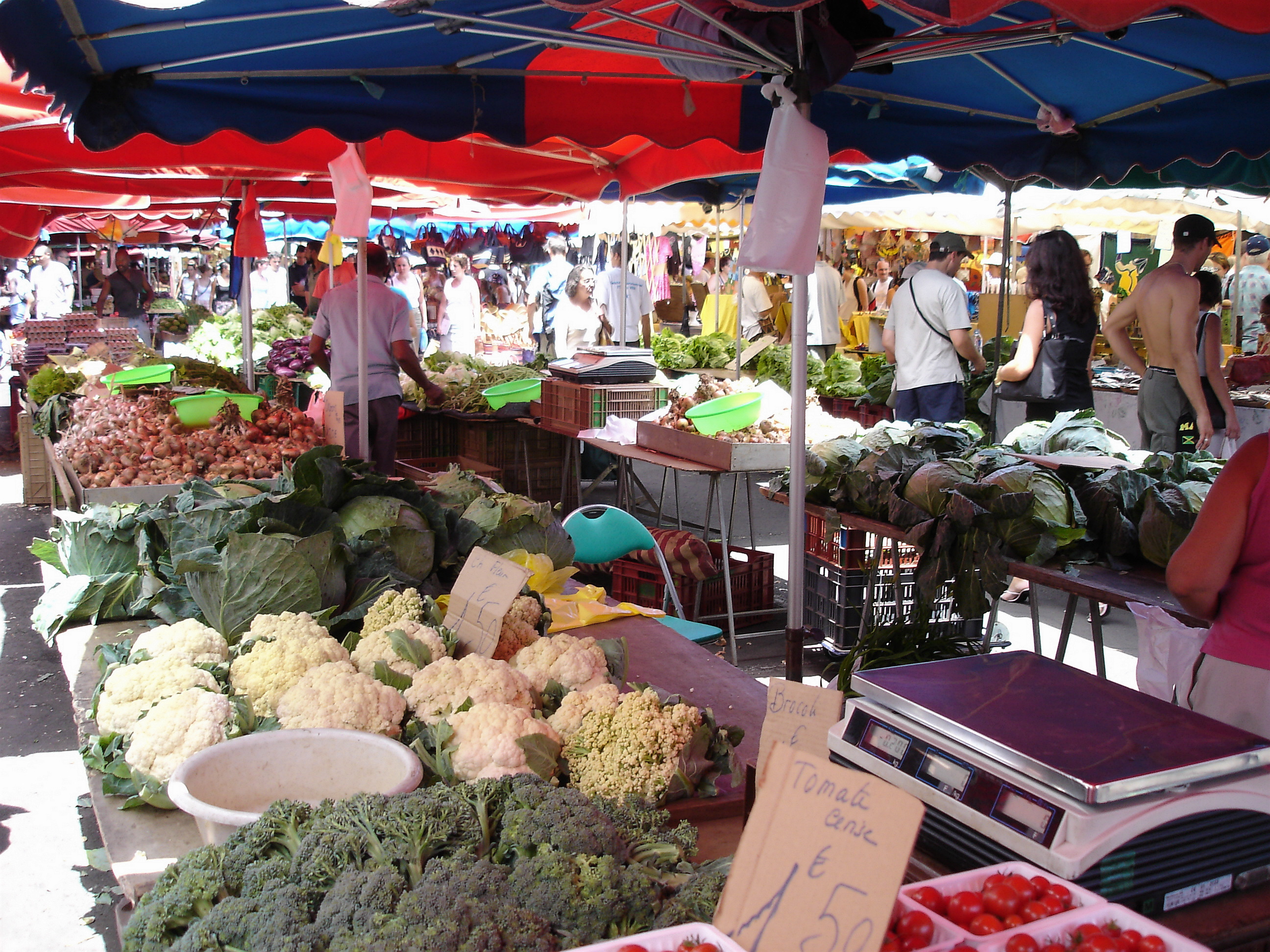 Description: Marché de Saint-Paul, november 2004, La Réunion Source: Bouba